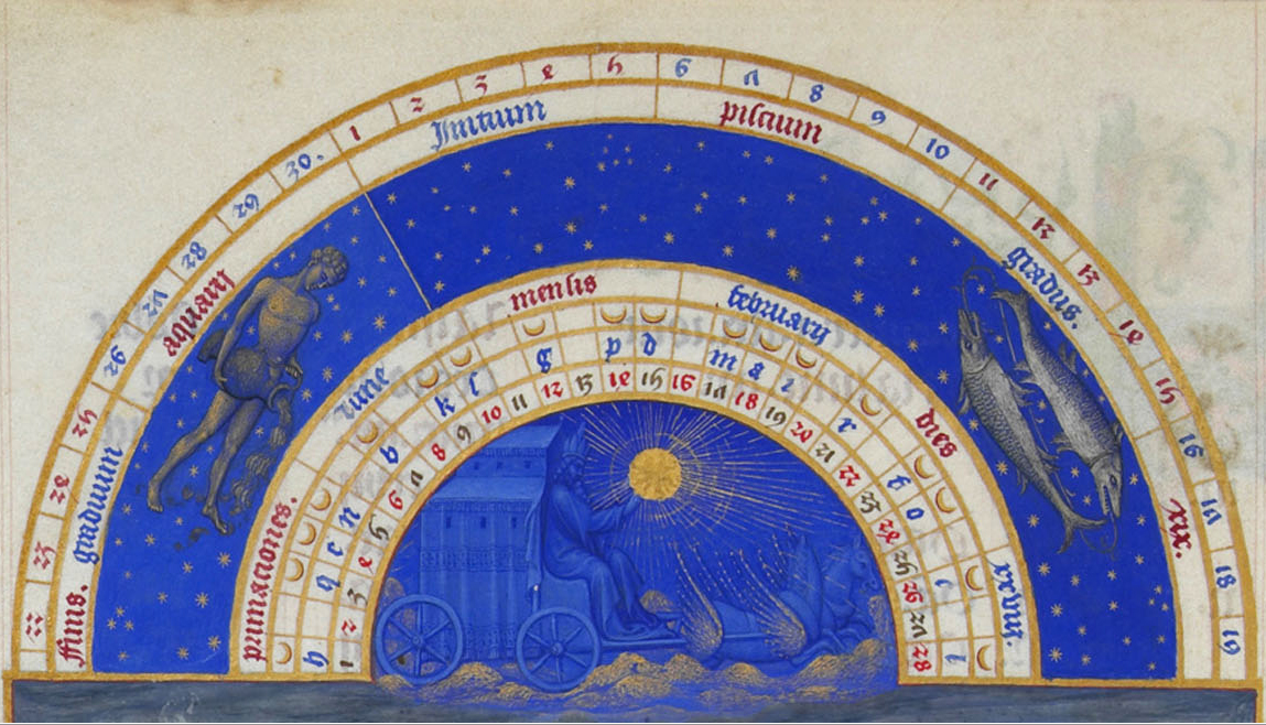 Hemisfeer boven de klanderminiatuur van februari